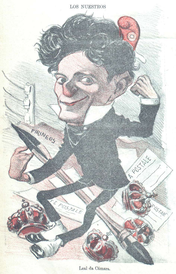 Caricatura.